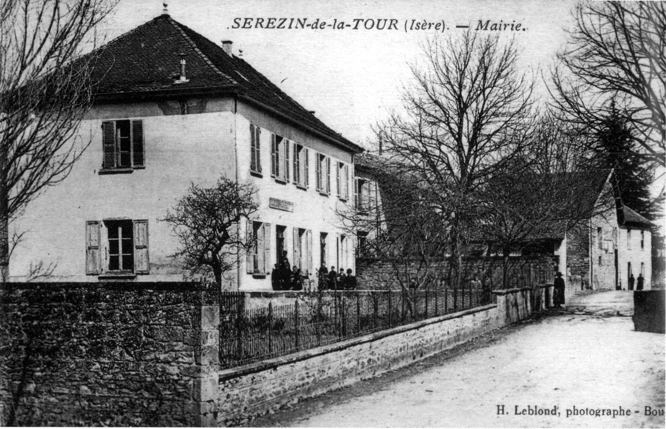 Sérézin-de-la-Tour, mairie en 1908